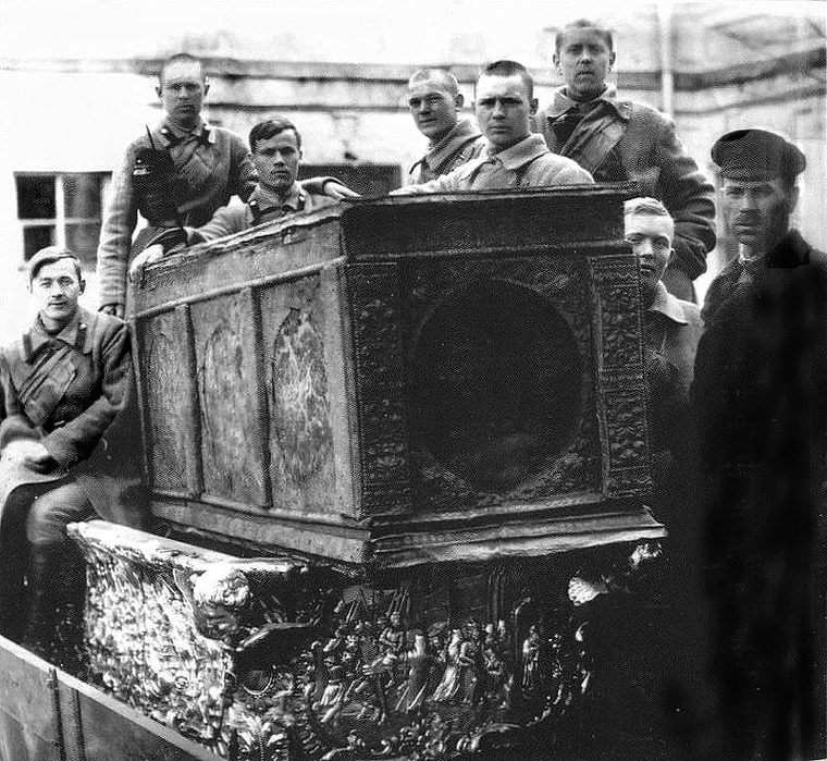 Вскрытие раки с мощами святого благоверного князя Александра Невского. 1922.